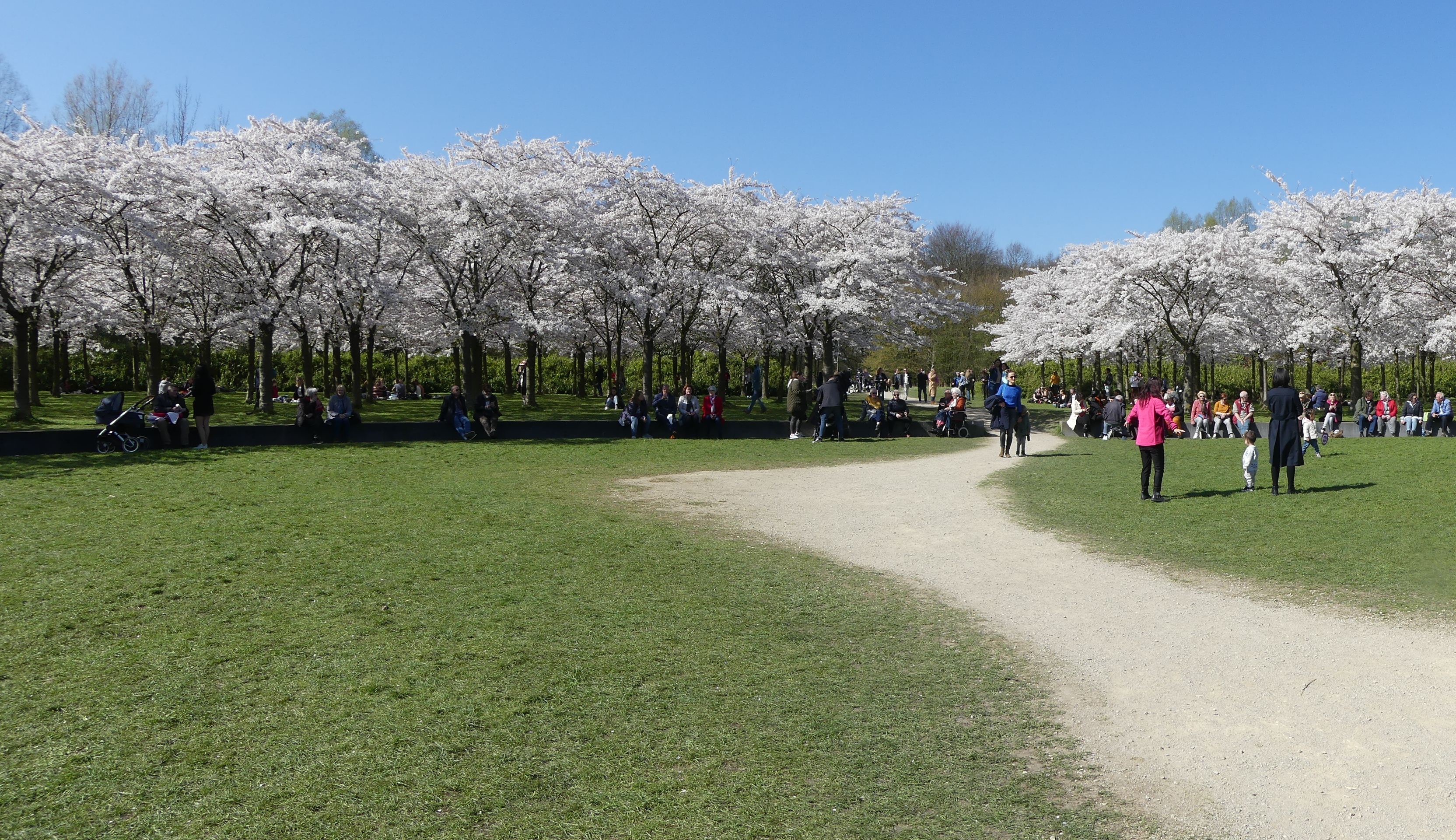 Zicht op een deel van het Kersenbloemsempark in het Amsterdamse Bos